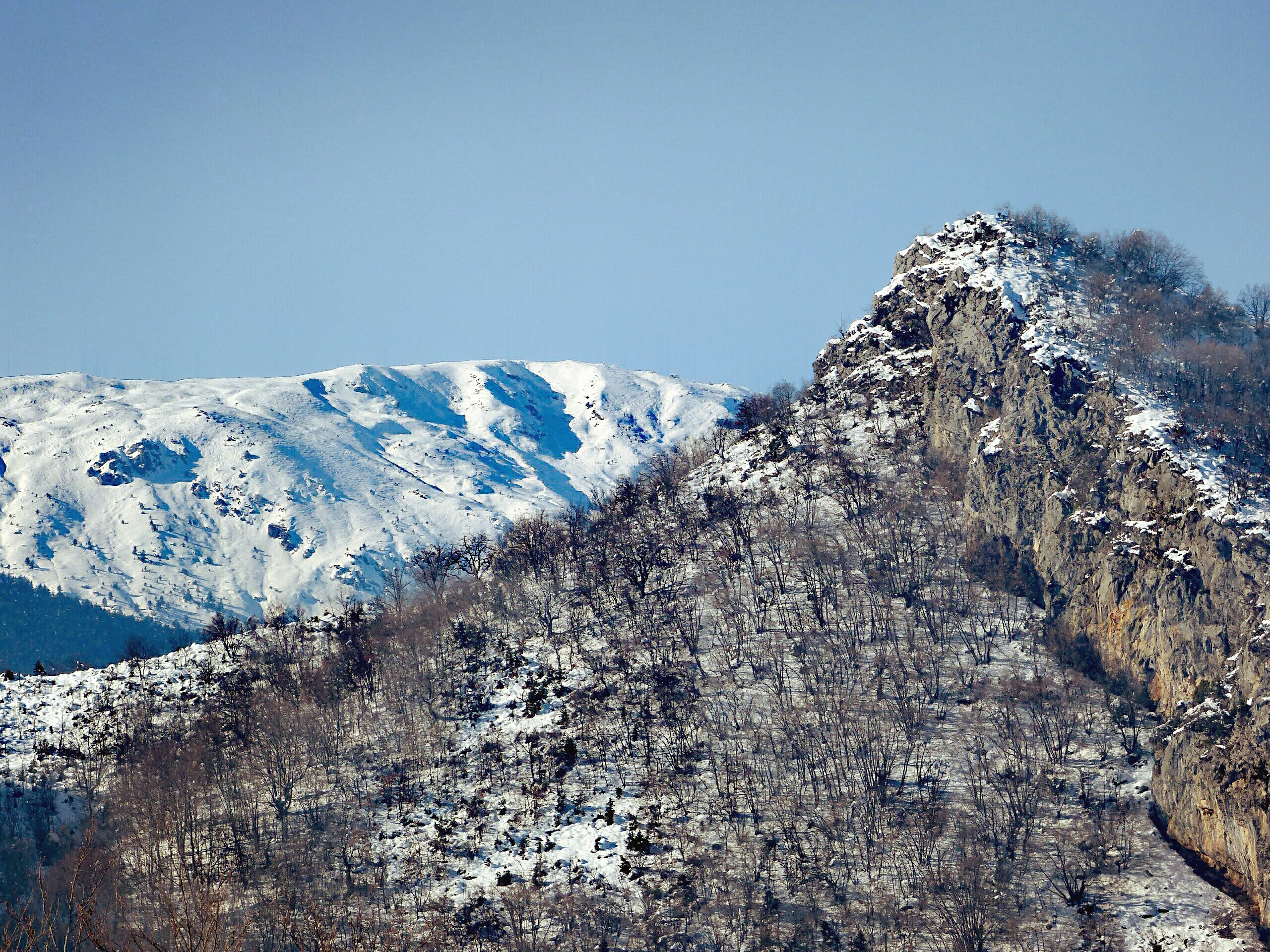 Το ύψωμα Γκάντατζ. Λόγο του σχήματος του προσδίδει στην Άνω Κορυφή ένα χαρακτηριστικό - σήμα κατατεθέν κατά μια άνοια.